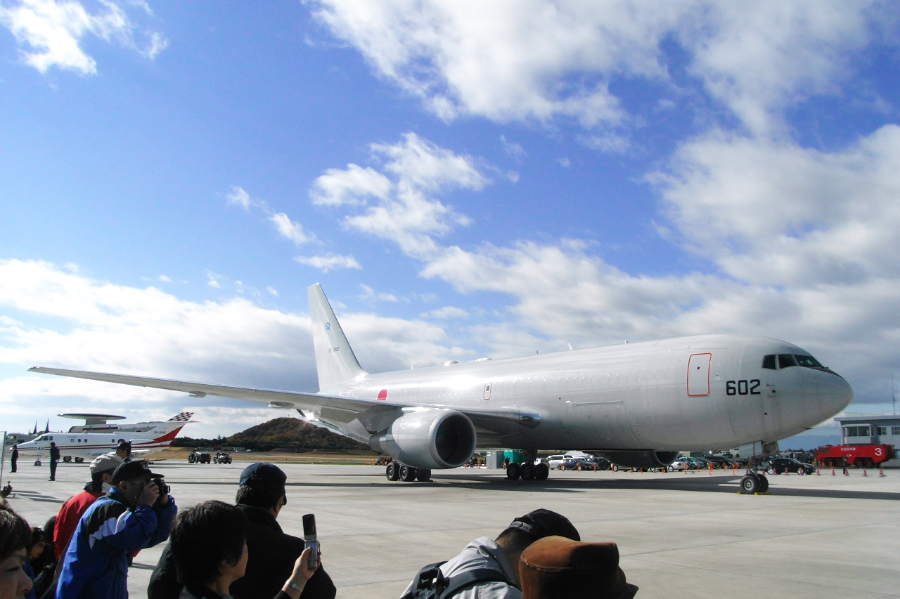 2008年11月30日、岐阜県の岐阜航空基地での航空祭より。空中給油機KC-767が後悔されてました。要はボーイングの767-200。